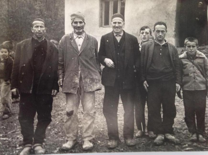 Foto familjar e bërë me rastiin e përfundimit të punimeve vullnetare (me vetkontribut) të objektit shkollor në Kokaj të Gjilani, Kosovë